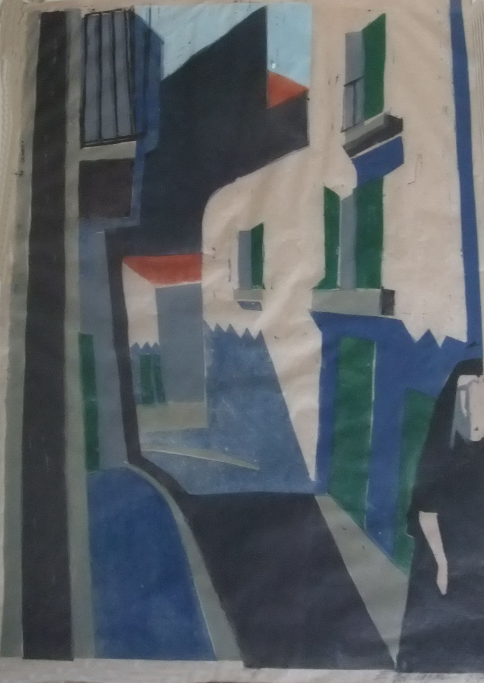 Aquarell aus dem Jahre 1957